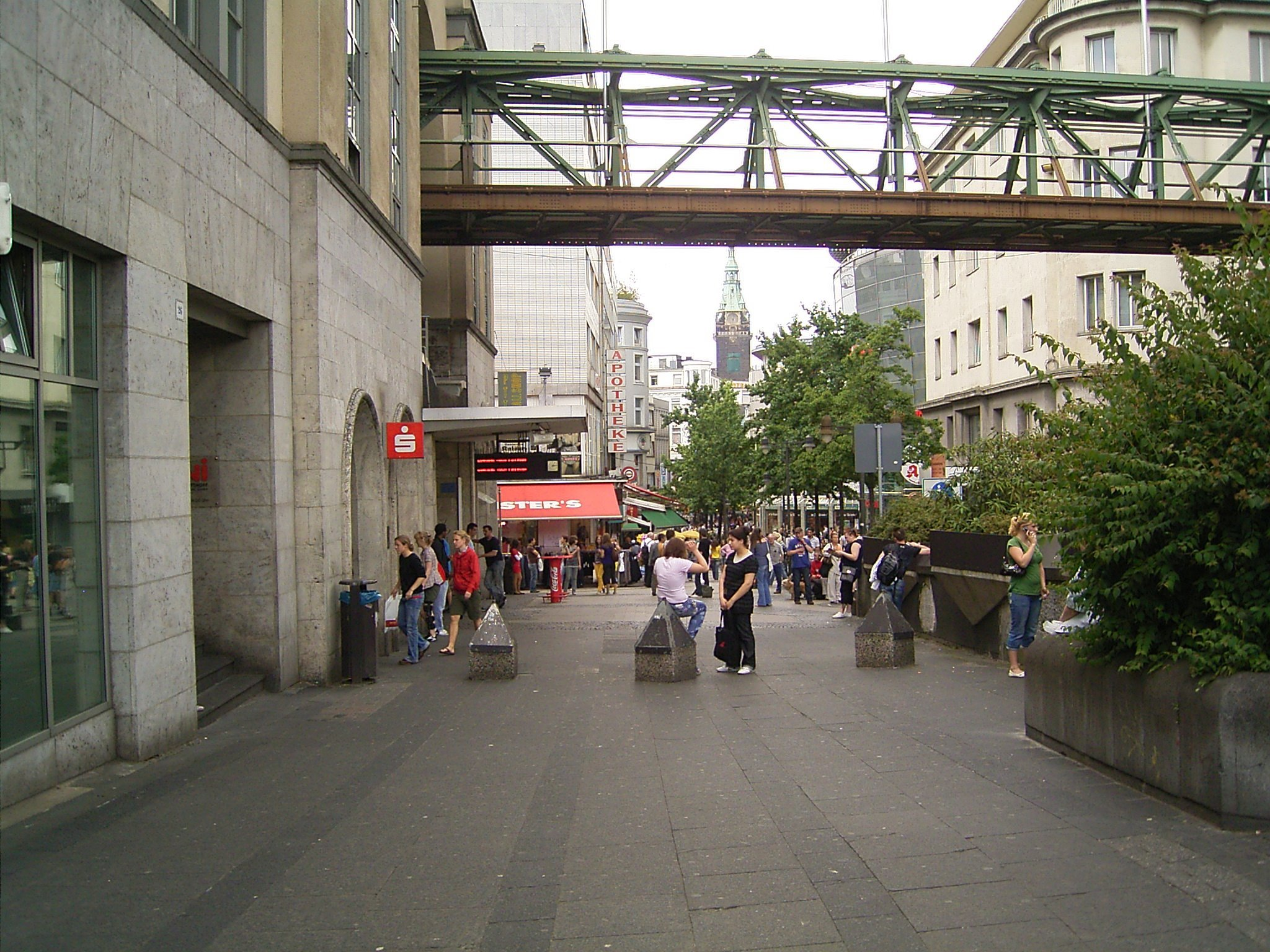 Wupperbrücke Alte Freiheit in Wuppertal